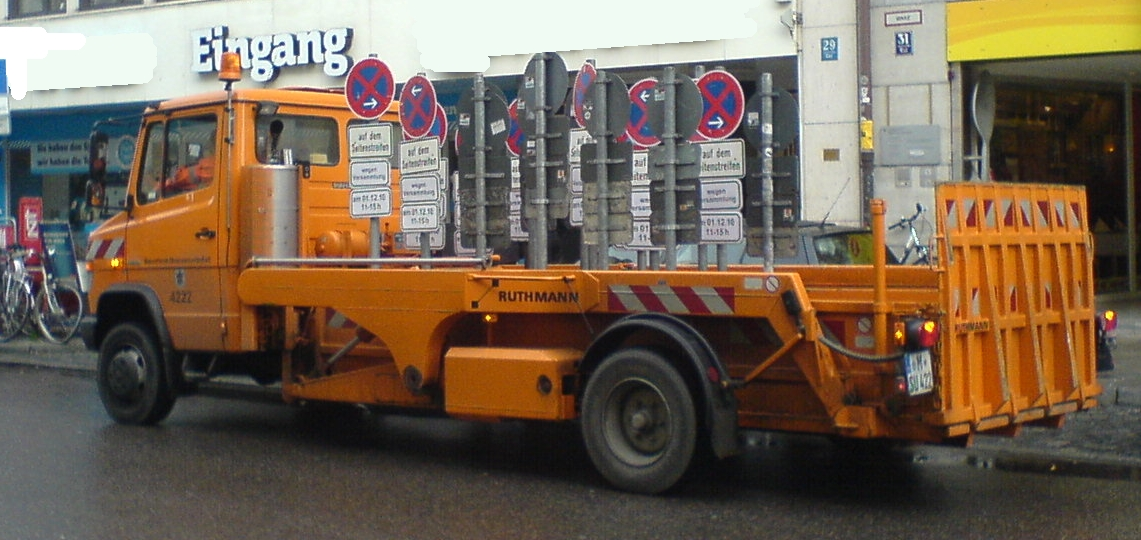 Transporter des Baureferats der Landeshauptstadt München für mobile Verkehrszeichen, Plattform kann auf Straßenniveau herabgelassen werden, um die Be- und Entladung zu erleichtern (Ruthmann auf Mercedes-Benz)